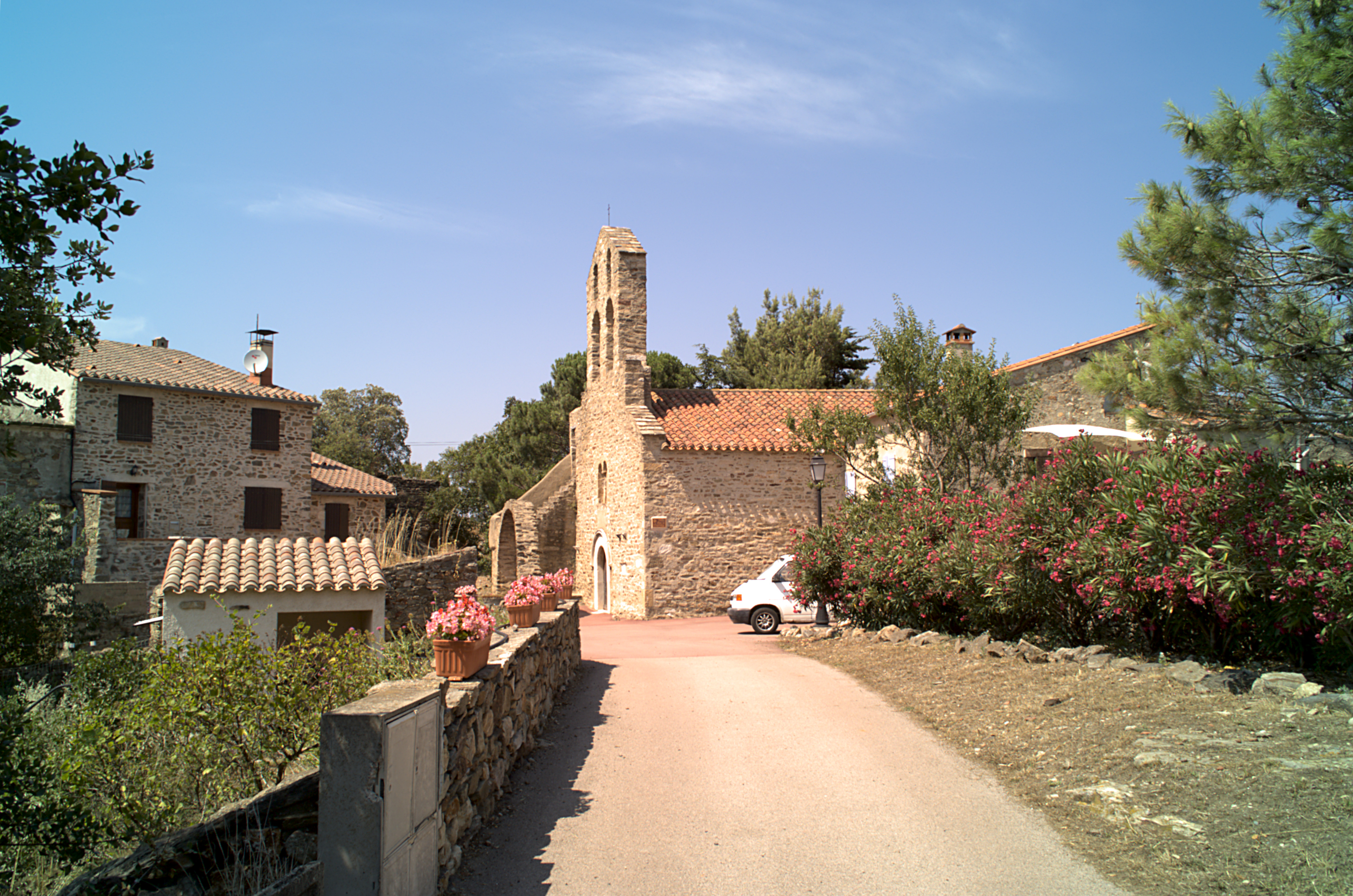 Église Sainte-Marie de La Cluse Haute, Les Cluses (Pyrénées-Orientales, Languedoc-Roussillon, France)